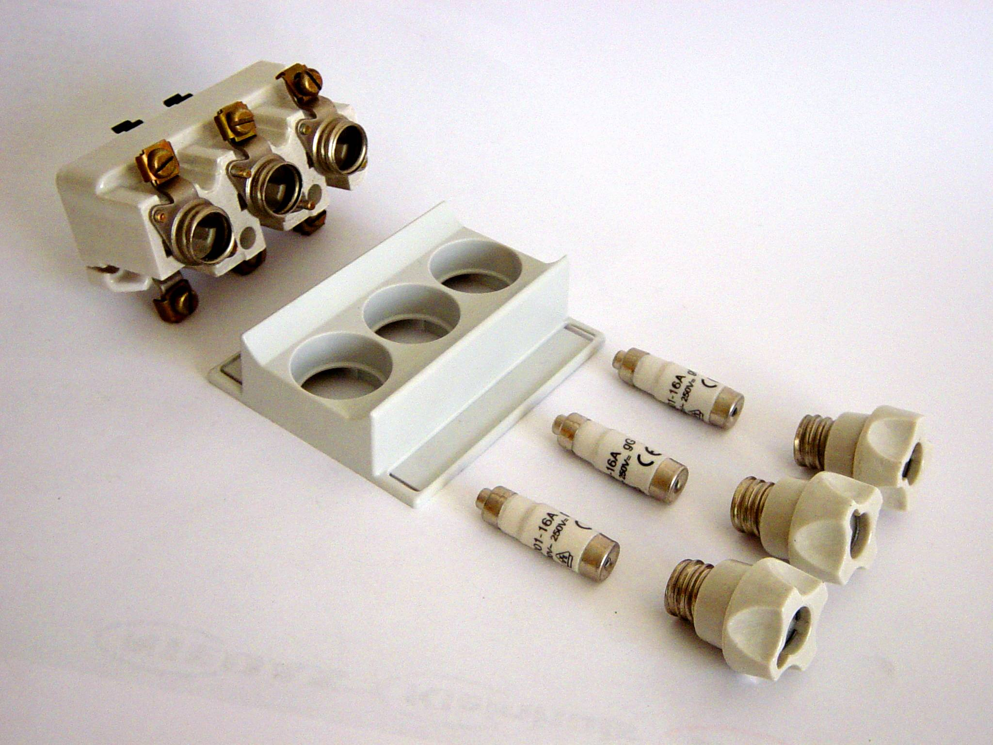 3-poliges Sicherungselement, 3x 16Ampere Neozed Sicherungen, Schraubverschlüsse